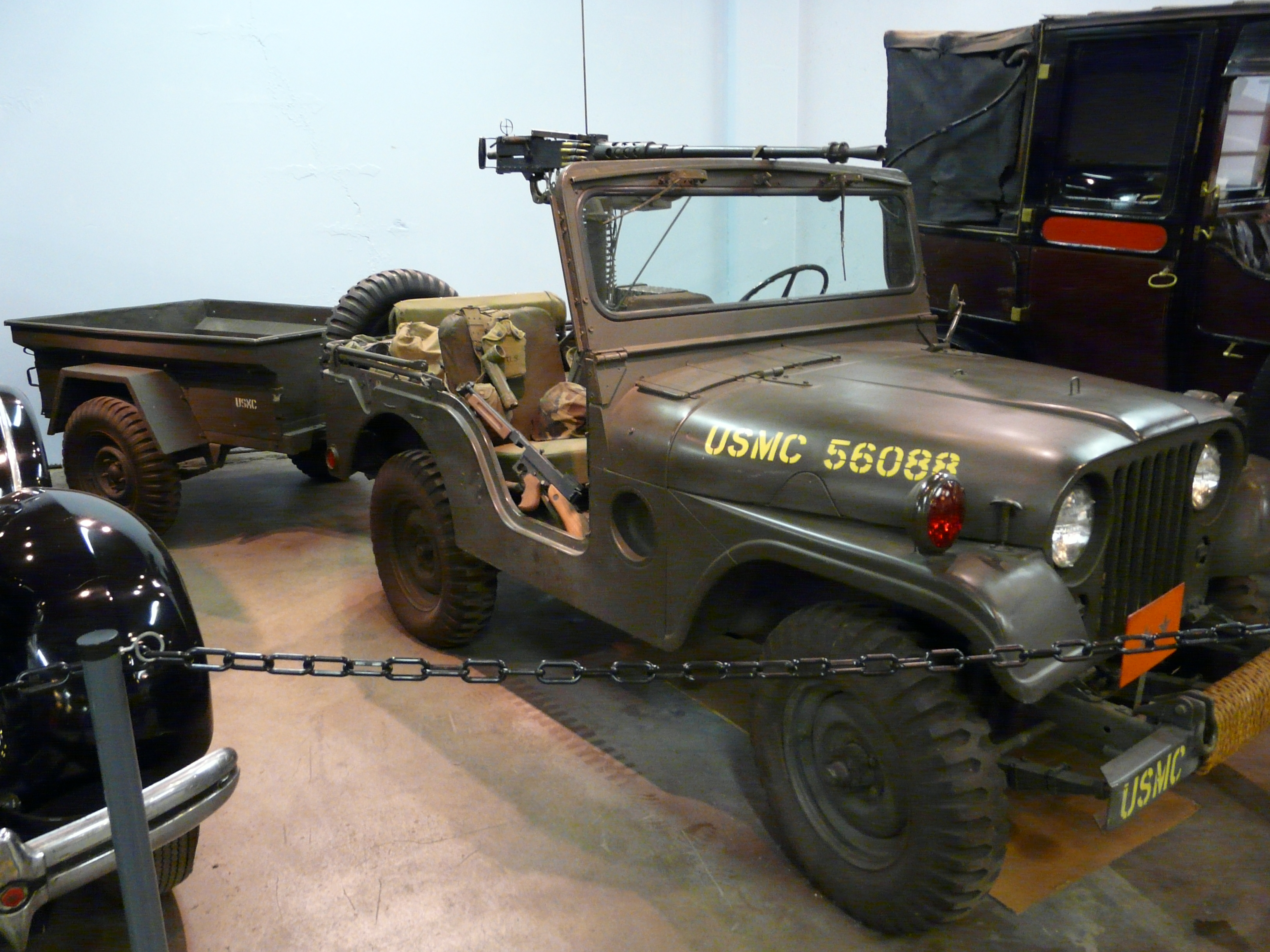 Denver, summer 2012